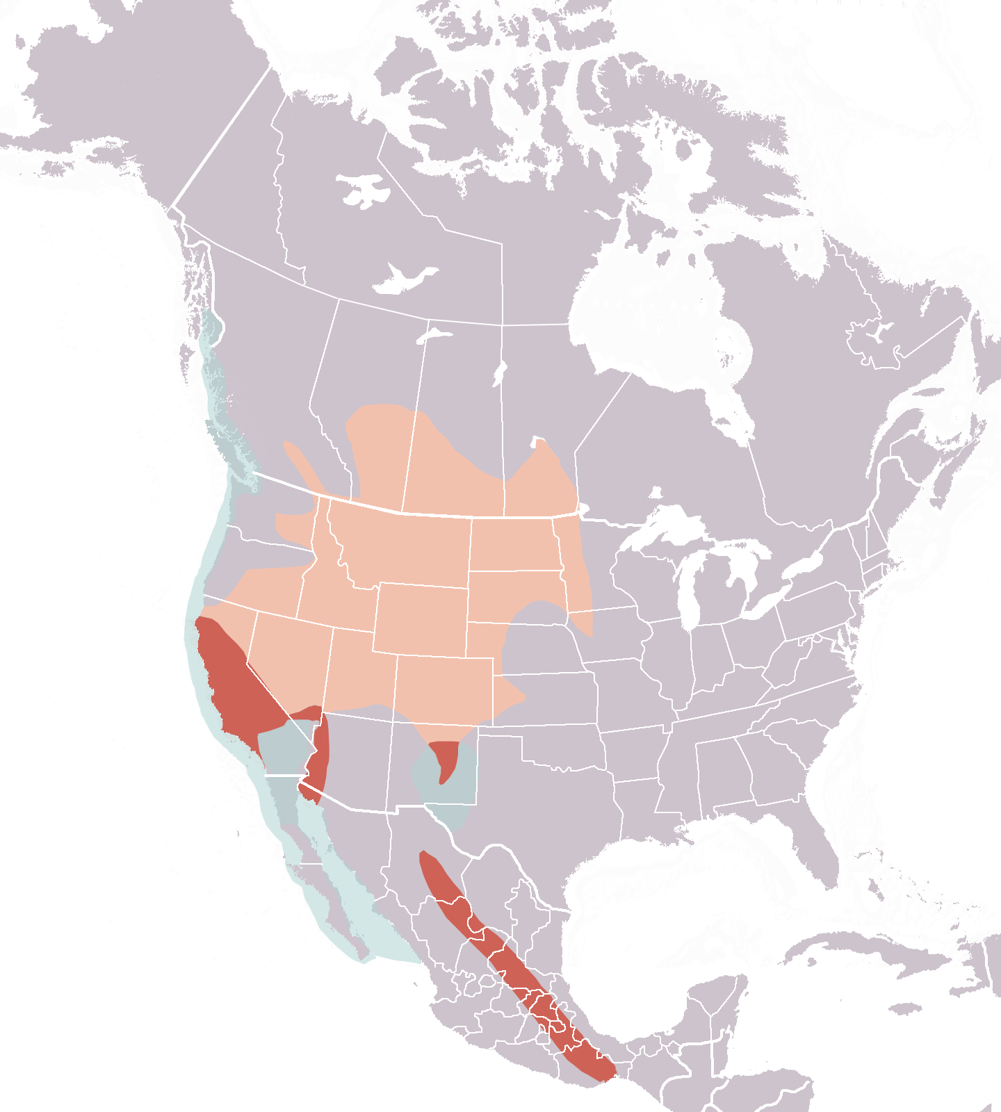 Western grebe range map